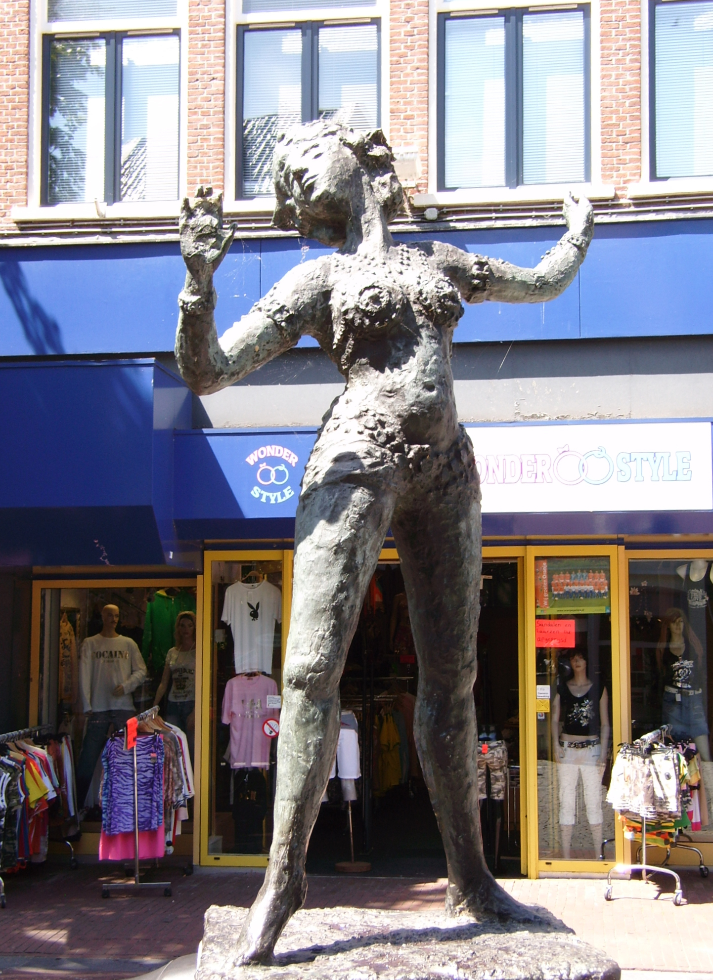 Leeuwarden, beeld van Mata Hari